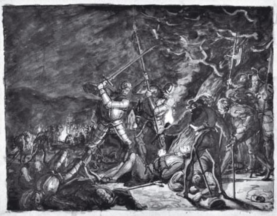 Schlacht bei Kappel. Der Tod des Reformators Huldrych Zwingli in der Schlacht bei Kappel am 11. 10. 1531. Aquarell über Feder von Karl Jauslin (zugeschrieben), um 1885, 23 x 30cm.